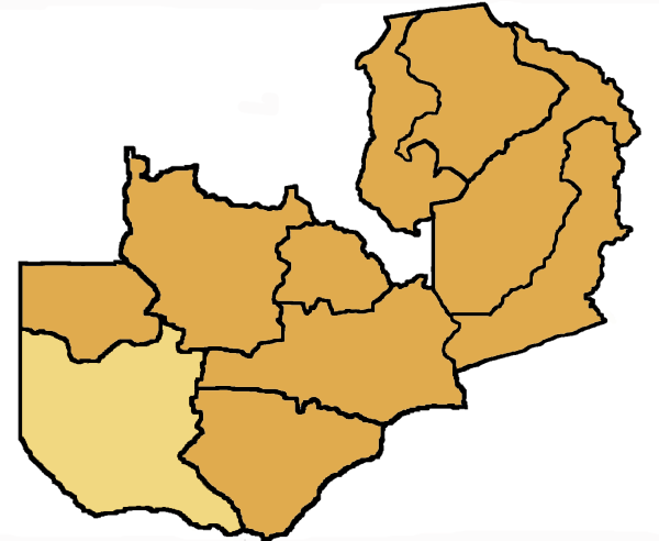 Mappa della diocesi di Livingstone, in Zambia. Lavoro personale, eseguito a partire da questa immagine di Commons. Fonte per i confini: Guida delle missioni cattoliche 2005, a cura della Congregatio pro gentium evangelizatione, Roma, Urbaniana University Press, 2005. Categoria:Chiesa cattolica in Zambia Categoria:Mappe dell'Africa